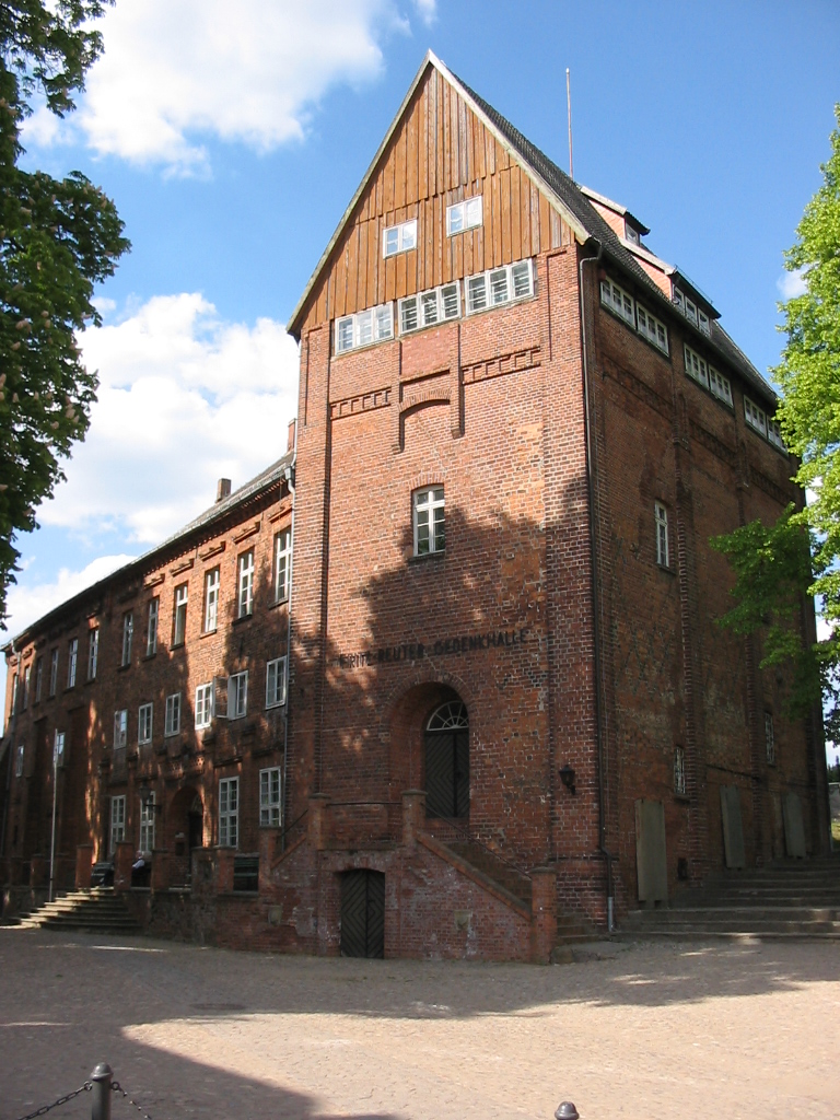 Gebäude im Innenhof der Festung Dömitz (Germany)